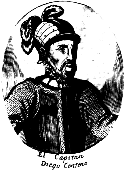 Diego Centeno, conquistador español, 1510-1549.